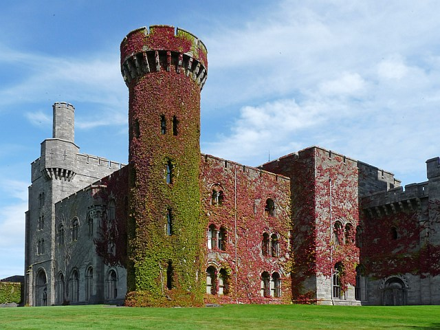 Penrhyn Castle